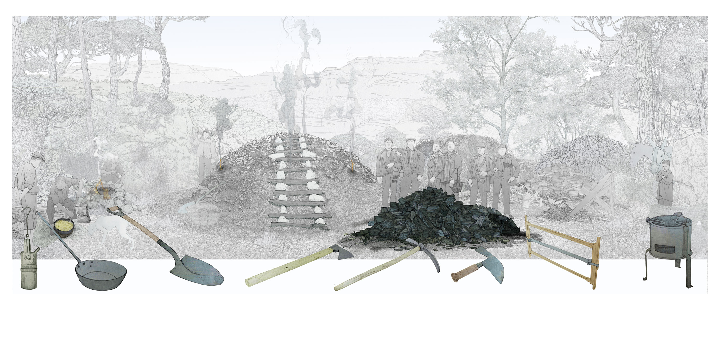 Il·lustracions d'Andrés Marín Jarque per a l'exposició permanent "Secà i Muntanya" del Museu Valencià d'Etnologia. S'il·lustren els escenaris del medi rural i el procés (treball) mitjançant el qual s'aprofita este espai.